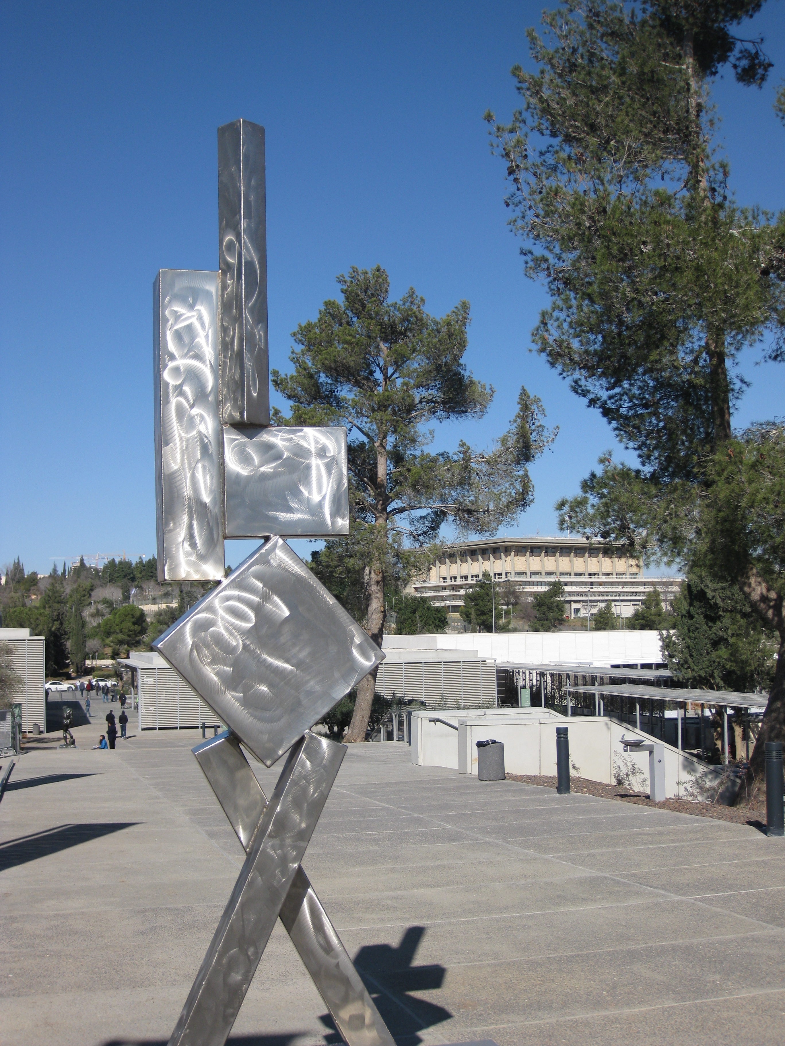 פיסול